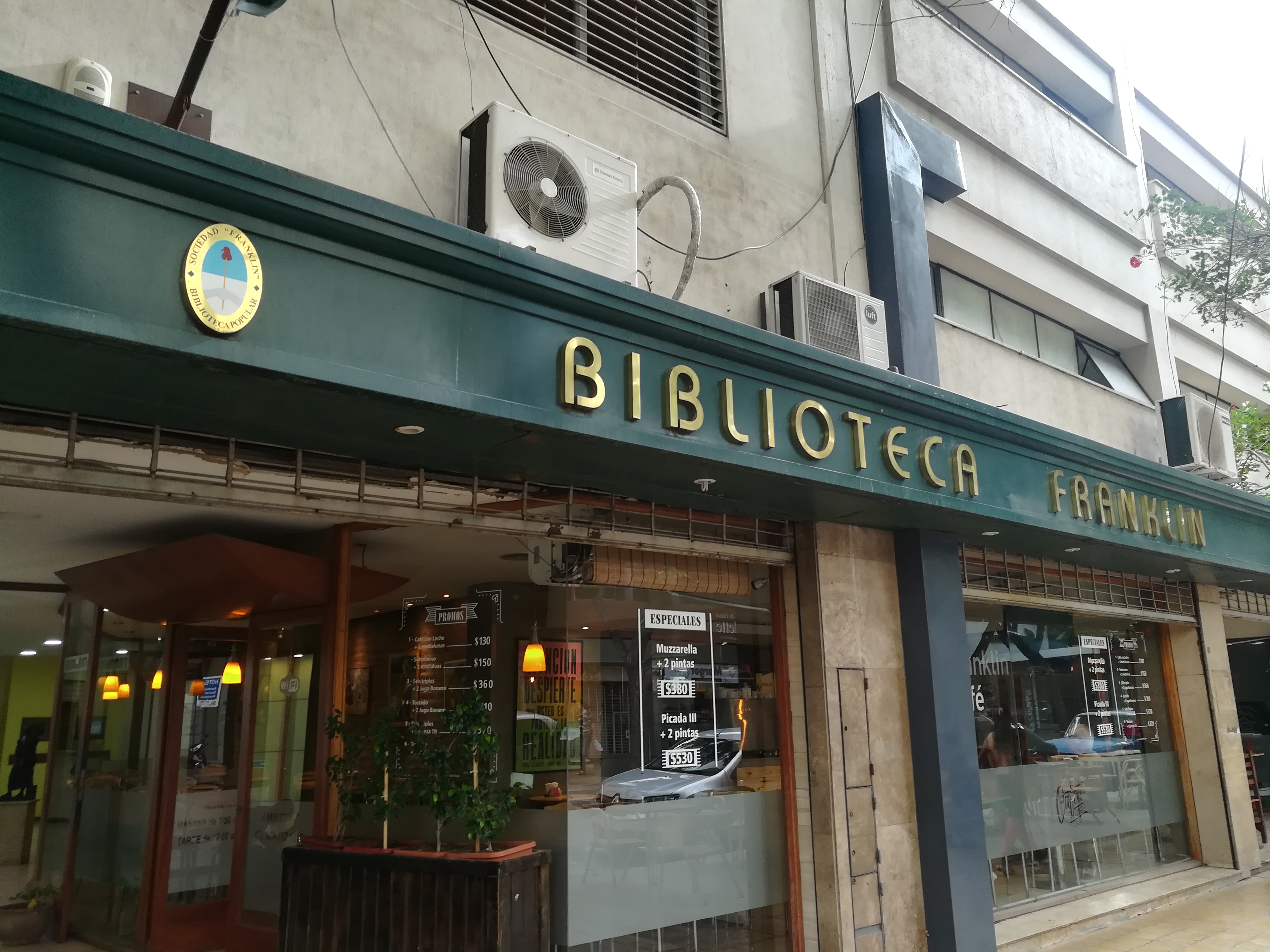 Biblioteca popular Franklin de la ciudad de San Juan, Provincia de San Juan, Argentina.